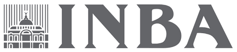 Logo del Instituto Nacional de Bellas Artes